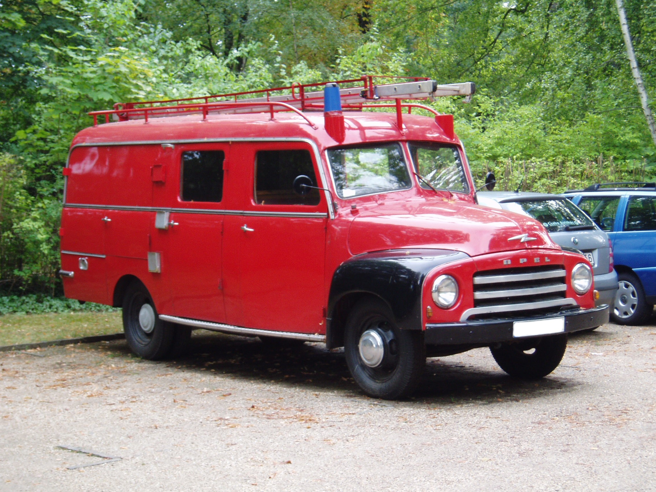 fire engine Opel Blitz.